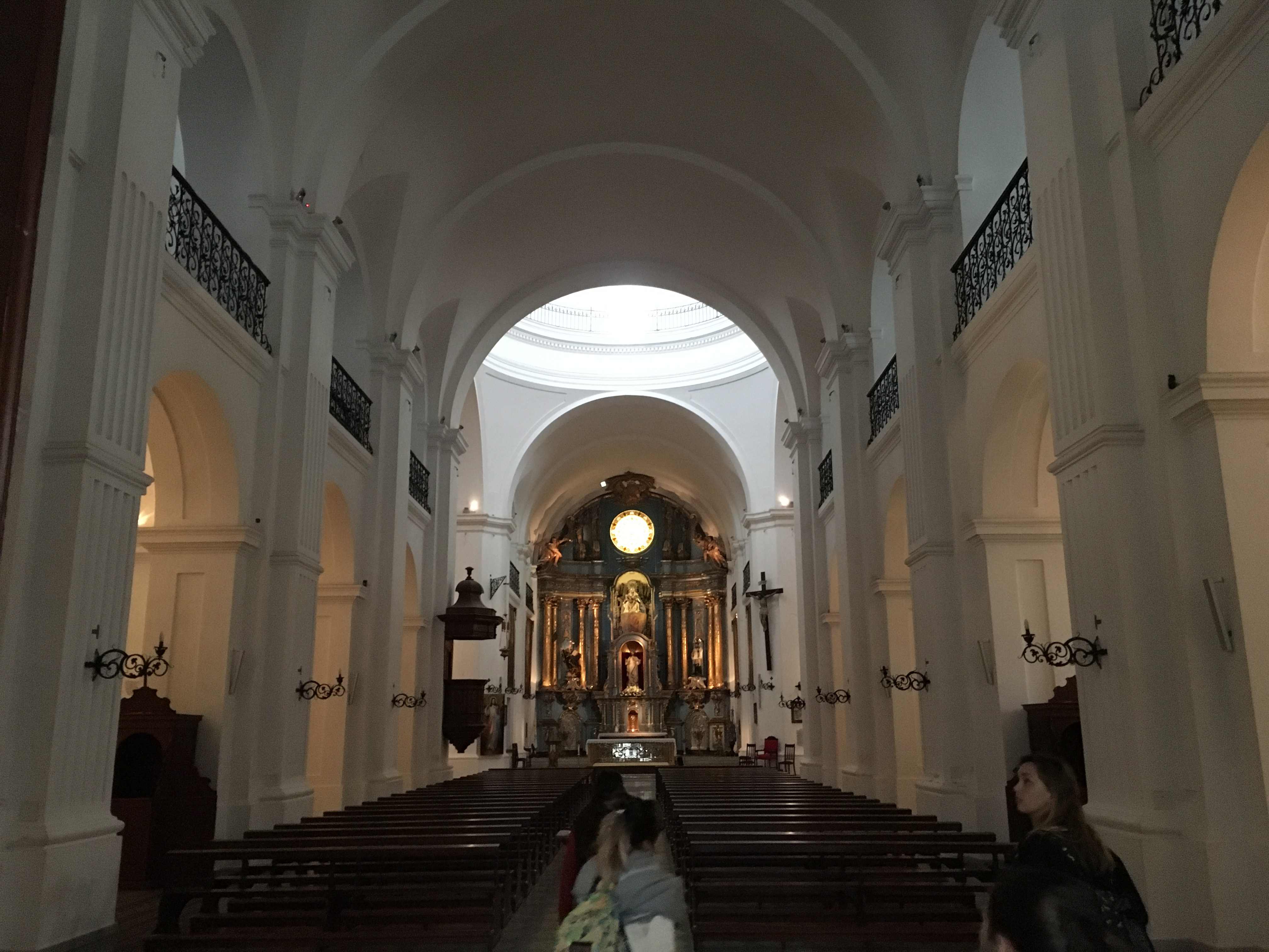 Interior de la Iglesia de San Ignacio en Montserrat, Buenos Aires, Argentina.